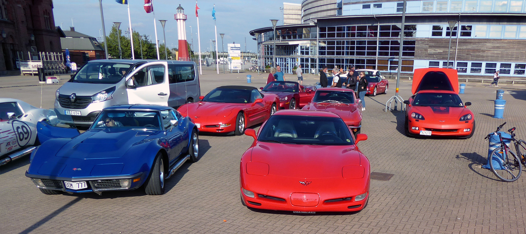 Chevrolet Corvette - Hamnplan i Ystad 27 juli 2919.